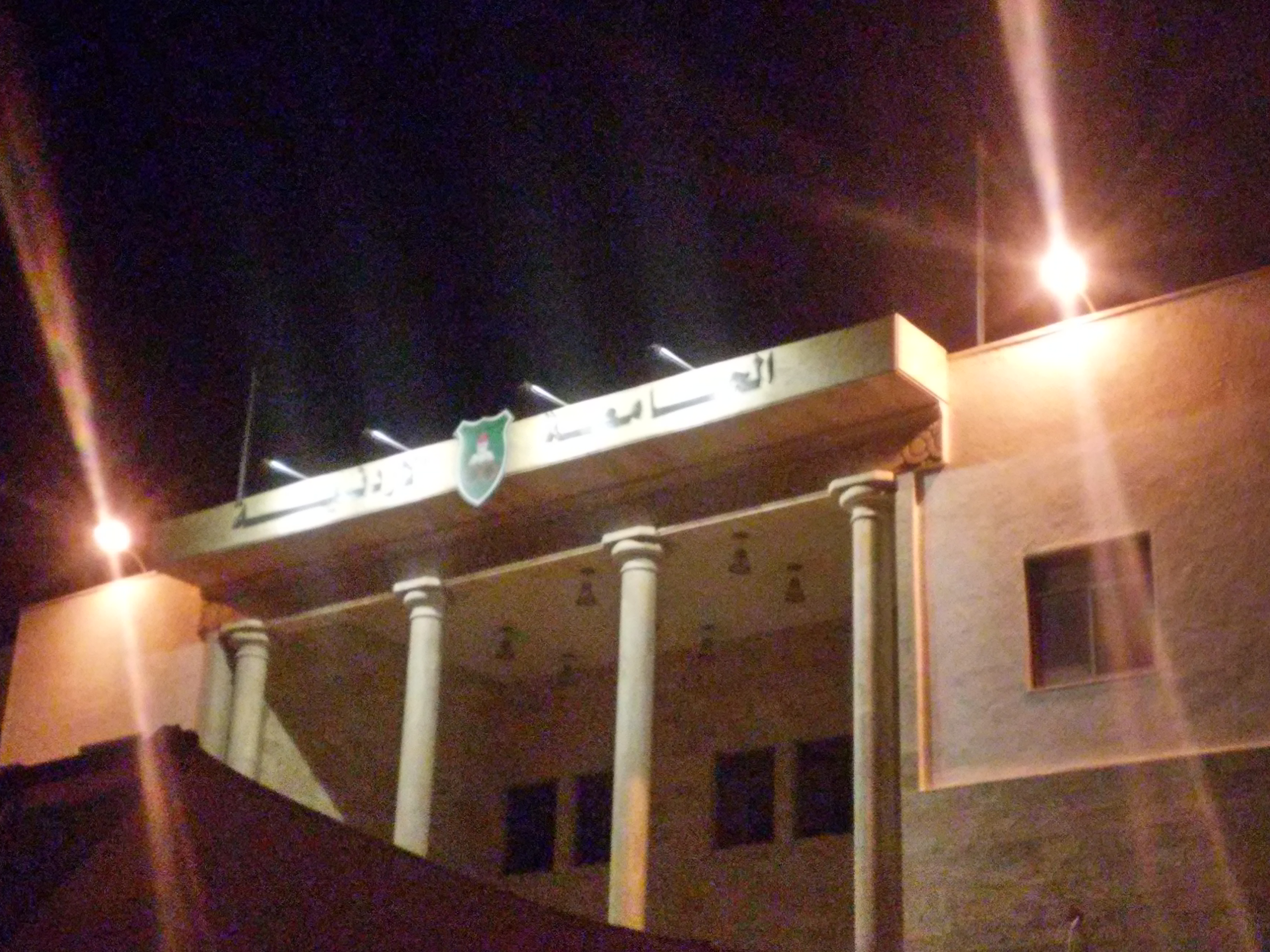 الجامعة الأردنية فرع العقبة تأسست عام 2009